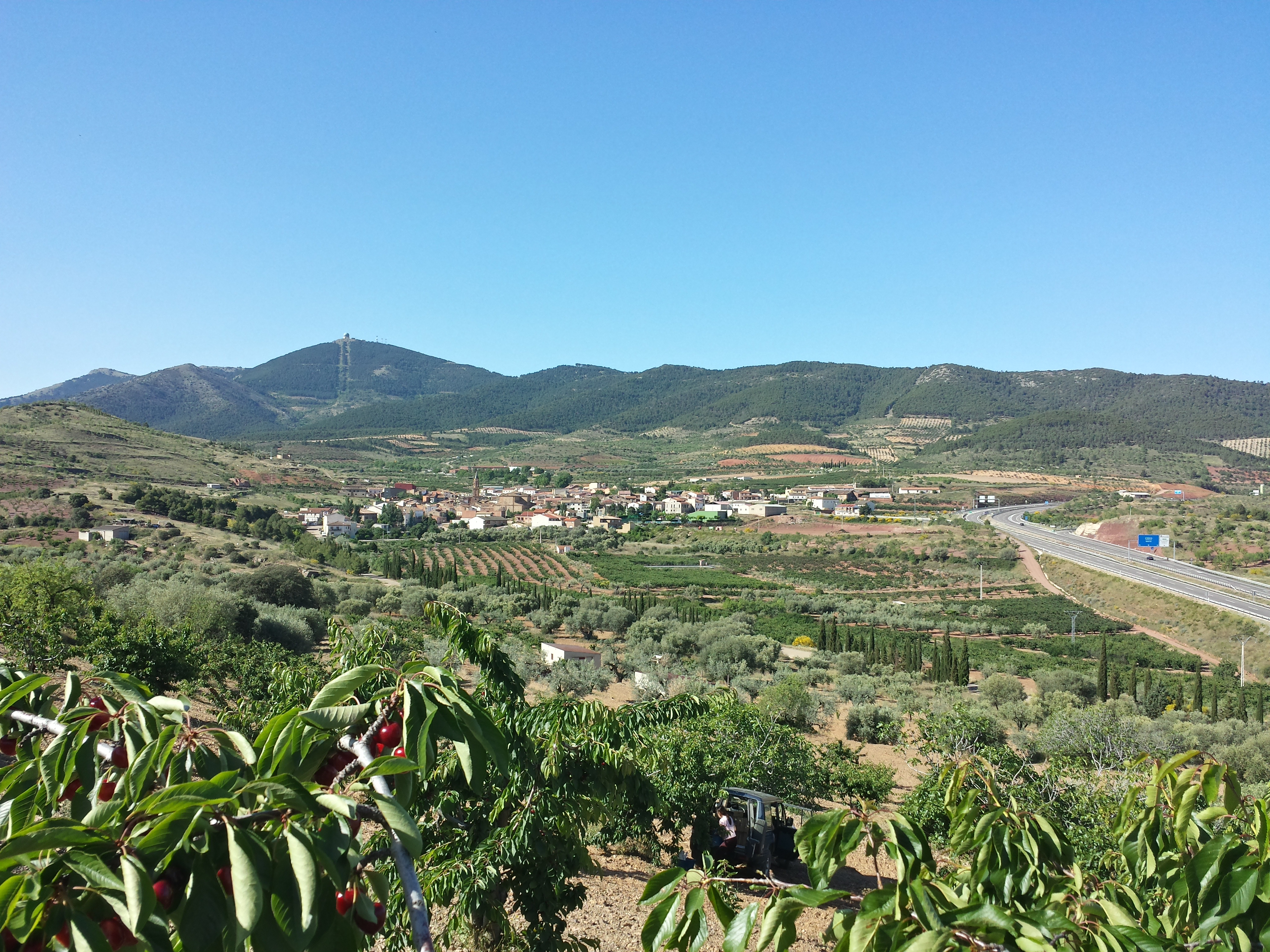 El Frasno con la Sierra de Vicor al fondo.